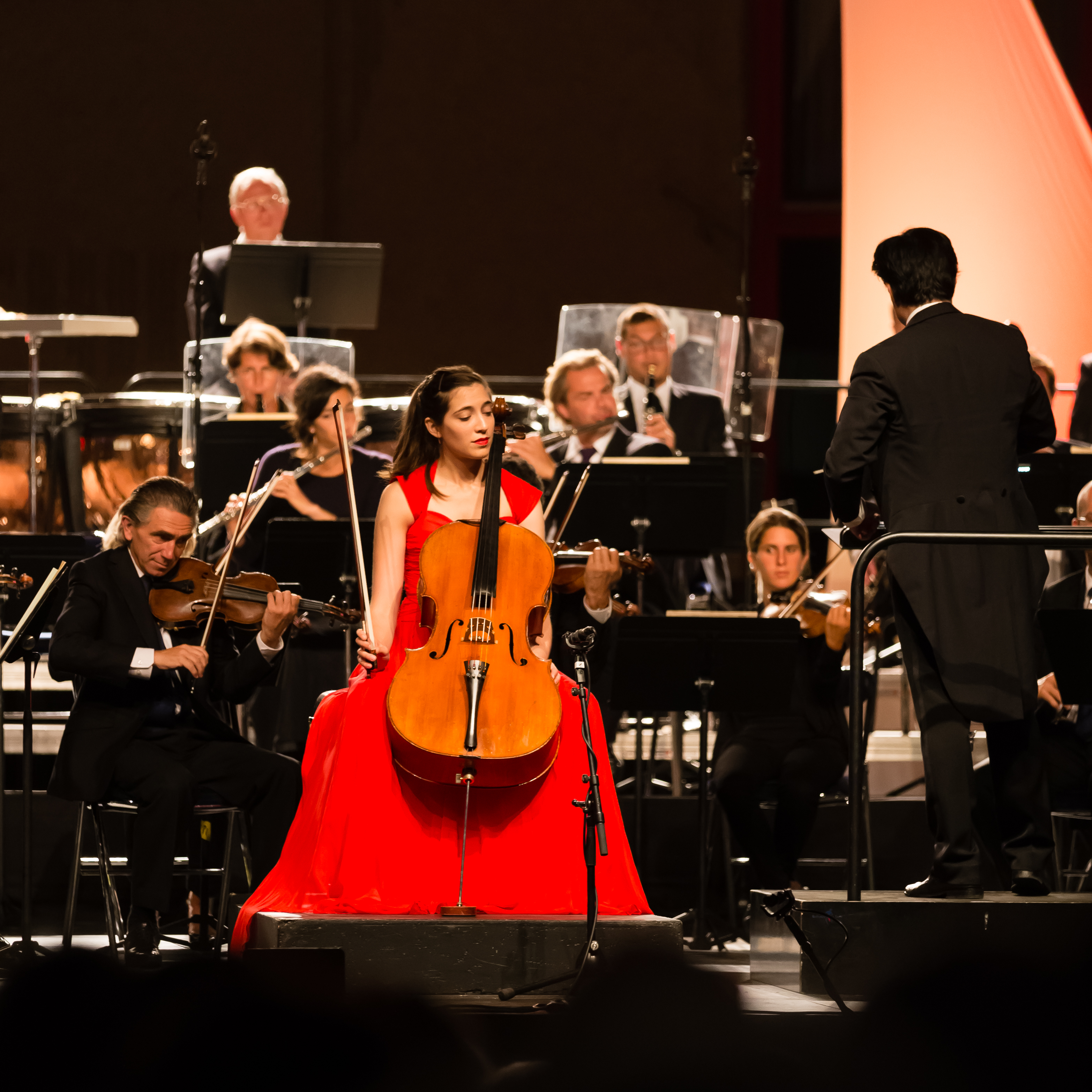 La violoncelliste Camille Thomas et le chef Darell Ang pendant l'exécution du Concerto pour violoncelle et orchestre en la mineur, op. 129 de Robert Schumann avec l'Orchestre symphonique de Bretagne.